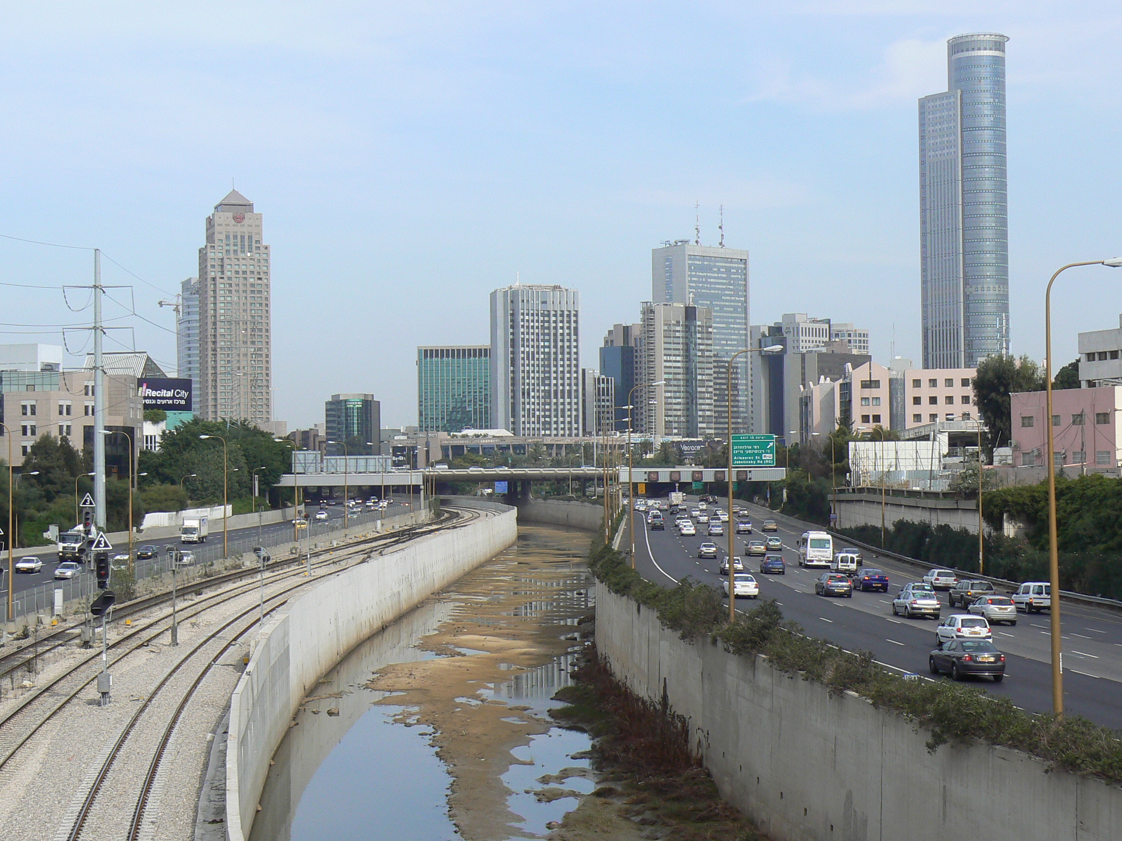 נחל איילון במבט מגשר מוזס לכוון המע"ר של רמת גן.